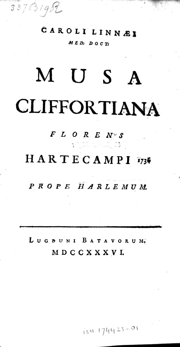 Titelblatt von Carl von Linnés Musa Cliffortiana , 1. Auflage, 1736